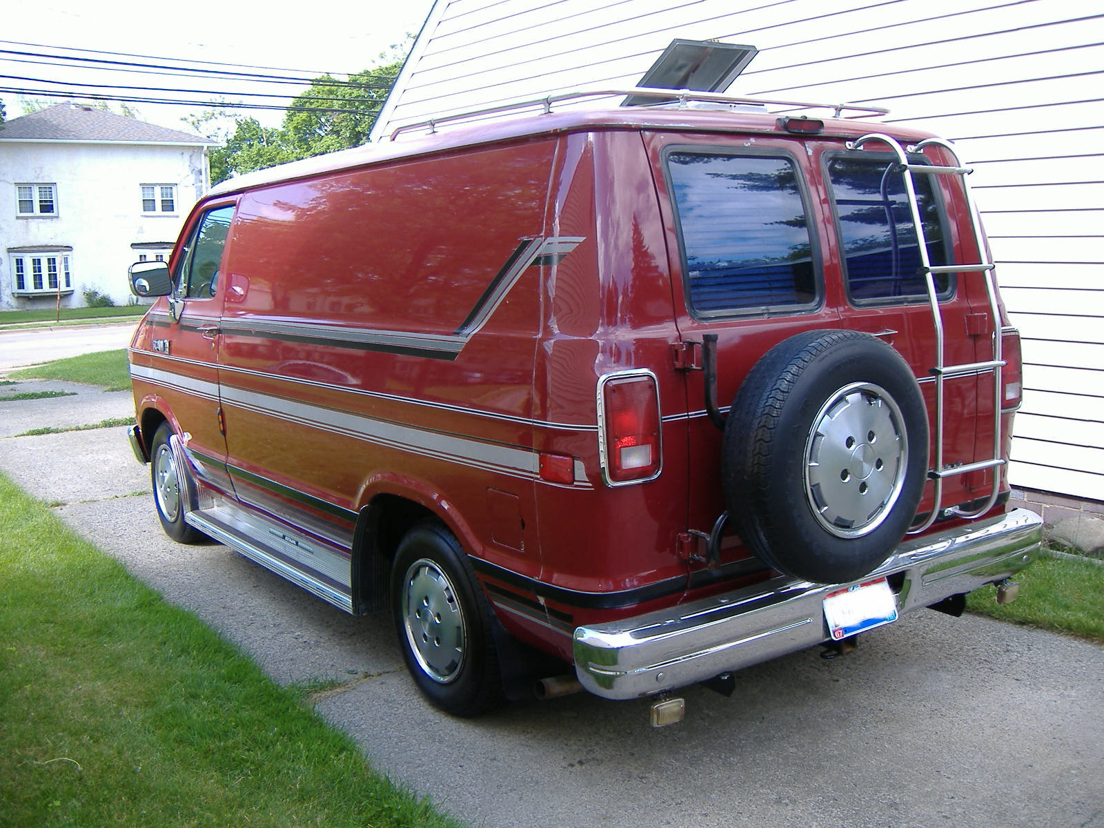 1989 Dodge B150 Van